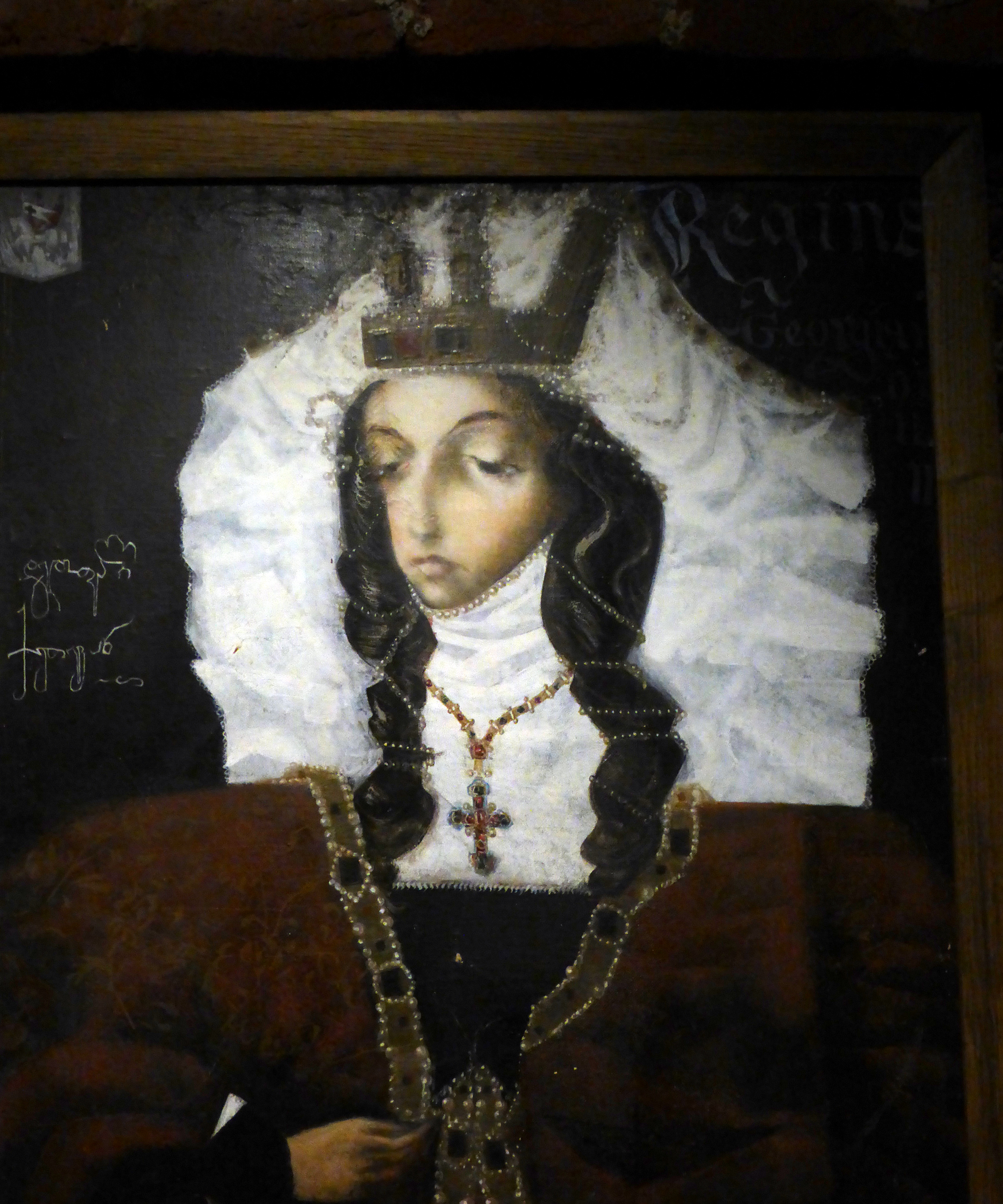 Queen Ketevan, Gremi Citadel